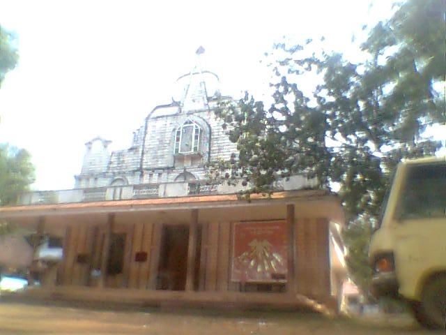 കുന്നപ്പിള്ളിശ്ശേരി ഗ്രാമത്തിലെ ക്രൈസ്തവ ദേവാലയം